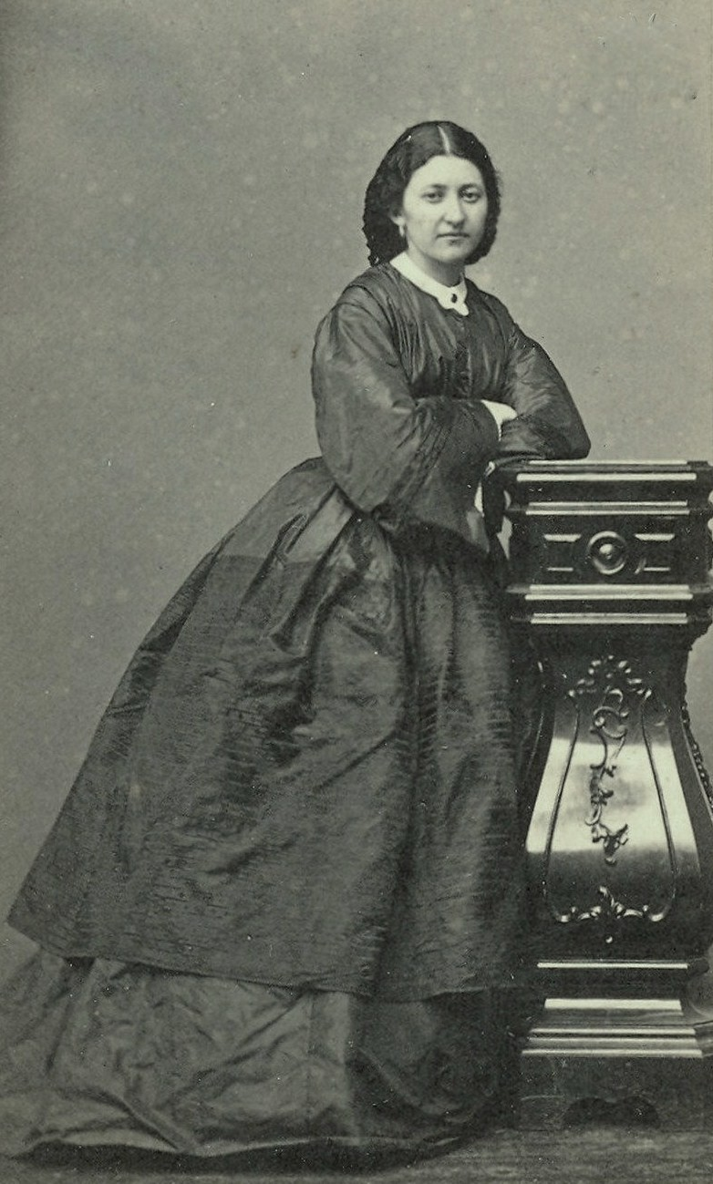 Баронесса Софья Александровна Николаи, ур. Чавчавадзе (1833—1862)